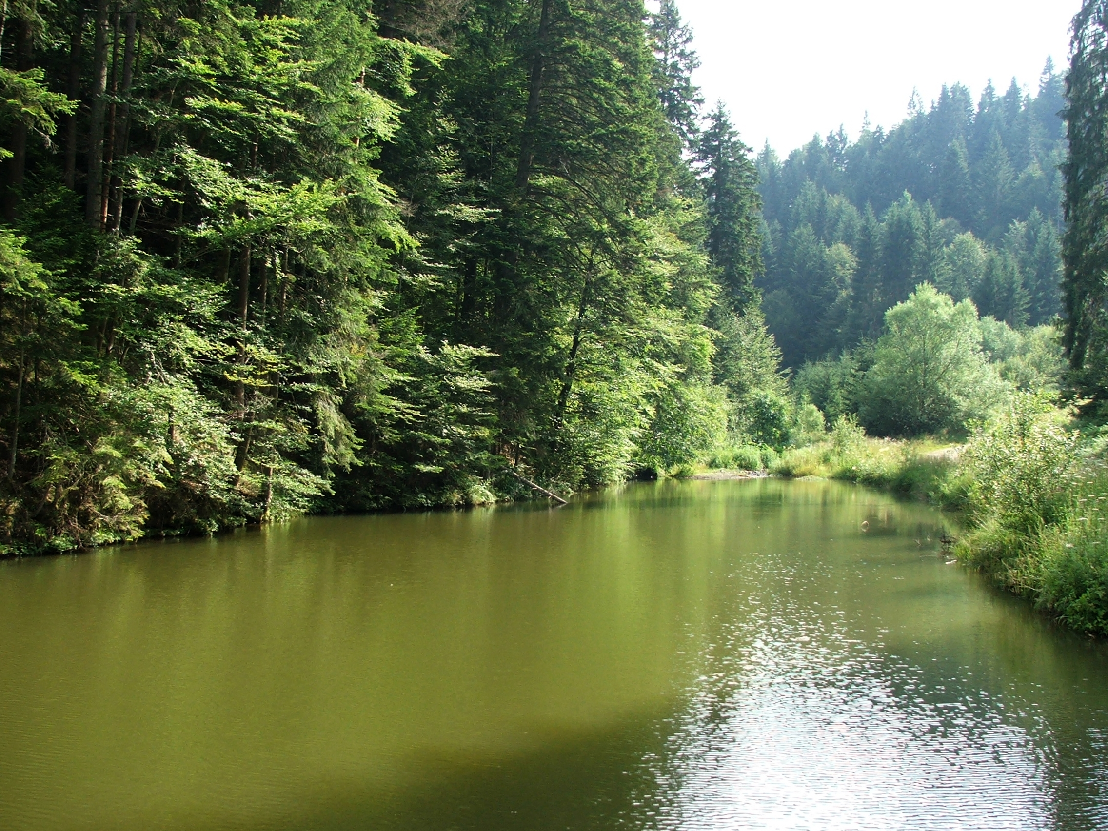 Ово је фотографија заштићеног природног добра у Србији под шифром: НП03This is a a photo of a natural area in Serbia with ID: НП03 NP TARA - Voda - Jezero Jarevac (NP03)